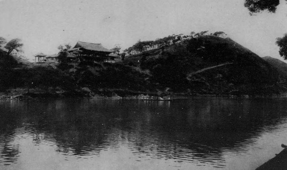 1365年に創建され、1844年に作り直された。密陽江のほとりにあり、密陽の官庁施設として客人を迎えてもてなした休憩所として使用された。